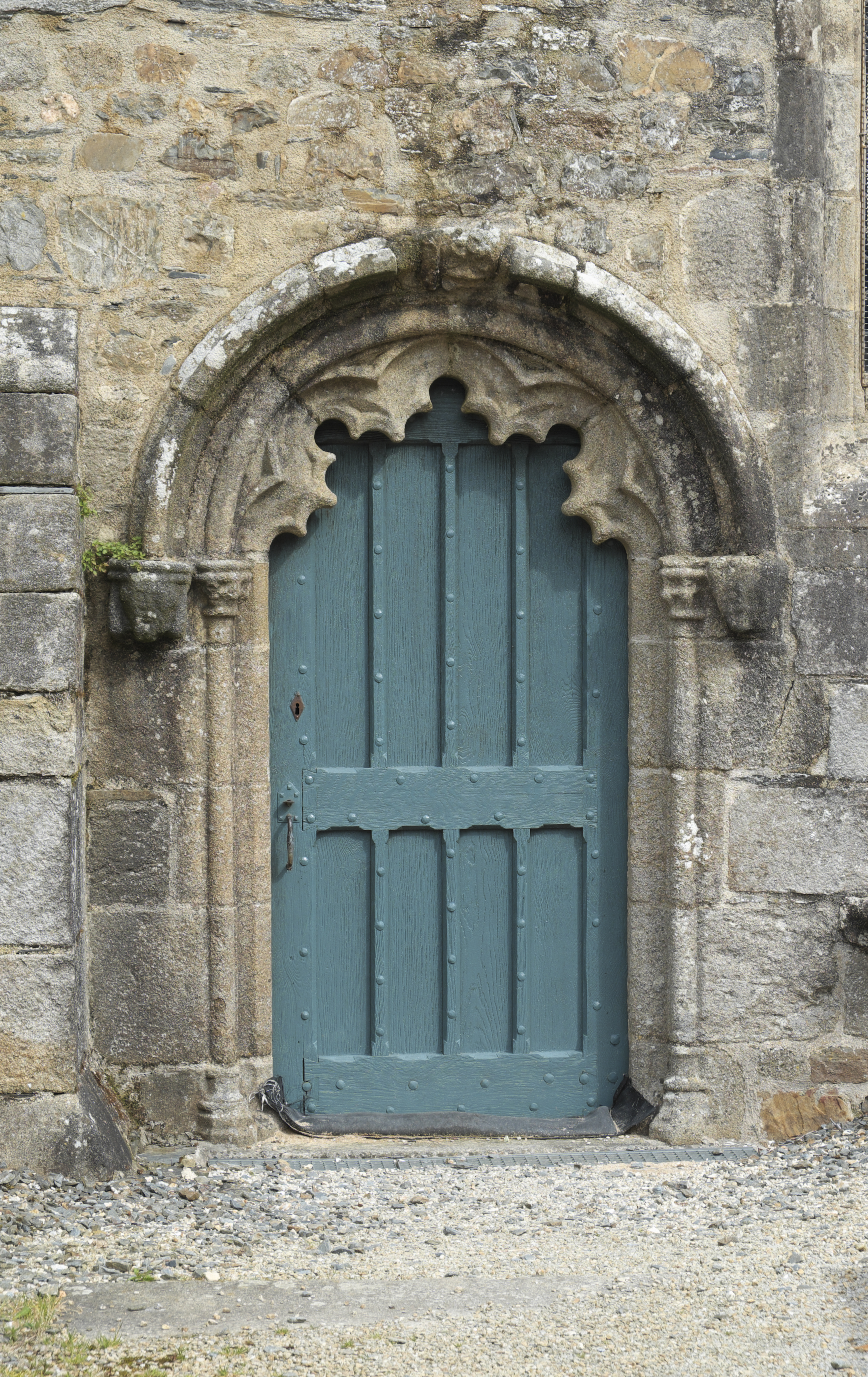 Katholische Pfarrkirche Saint-Salomon in La Martyre im Département Finistère (Region Bretagne/Frankreich), Zackenportal an der Südseite